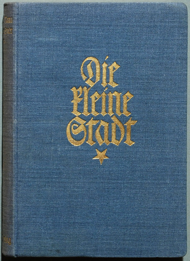 Mann, Heinrich: Die kleine Stadt. Roman. Leipzig: Insel-Verlag 1909, 437 S. Erstdruck (Wilpert/Gühring² 20)